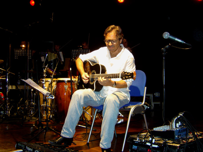 Al di Meola